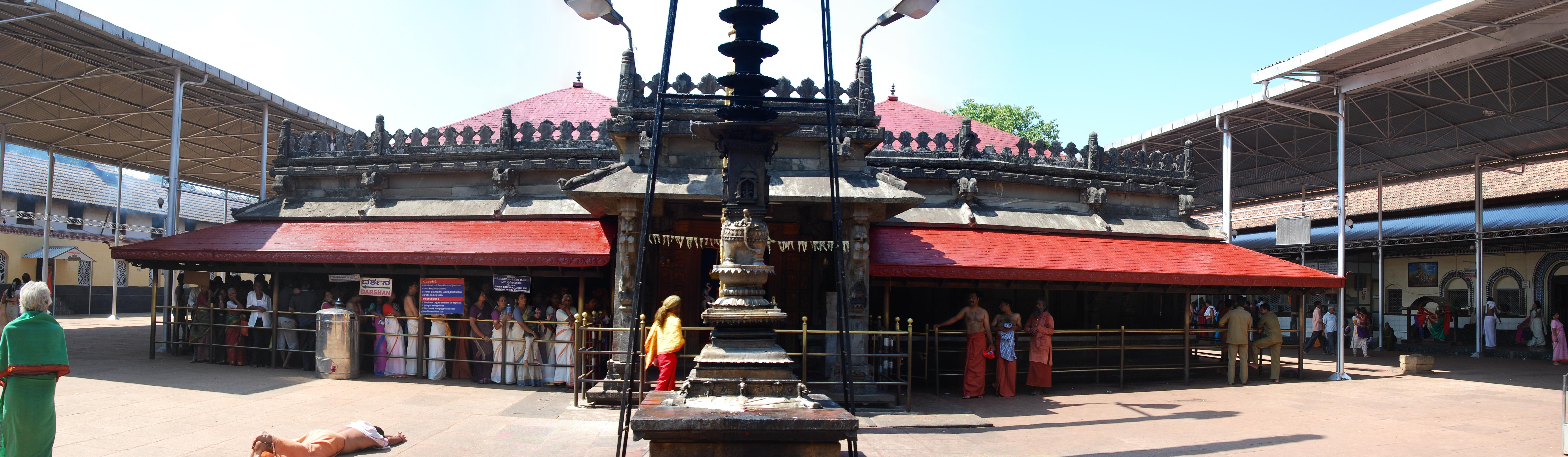 Mookambika Temple, Kollur